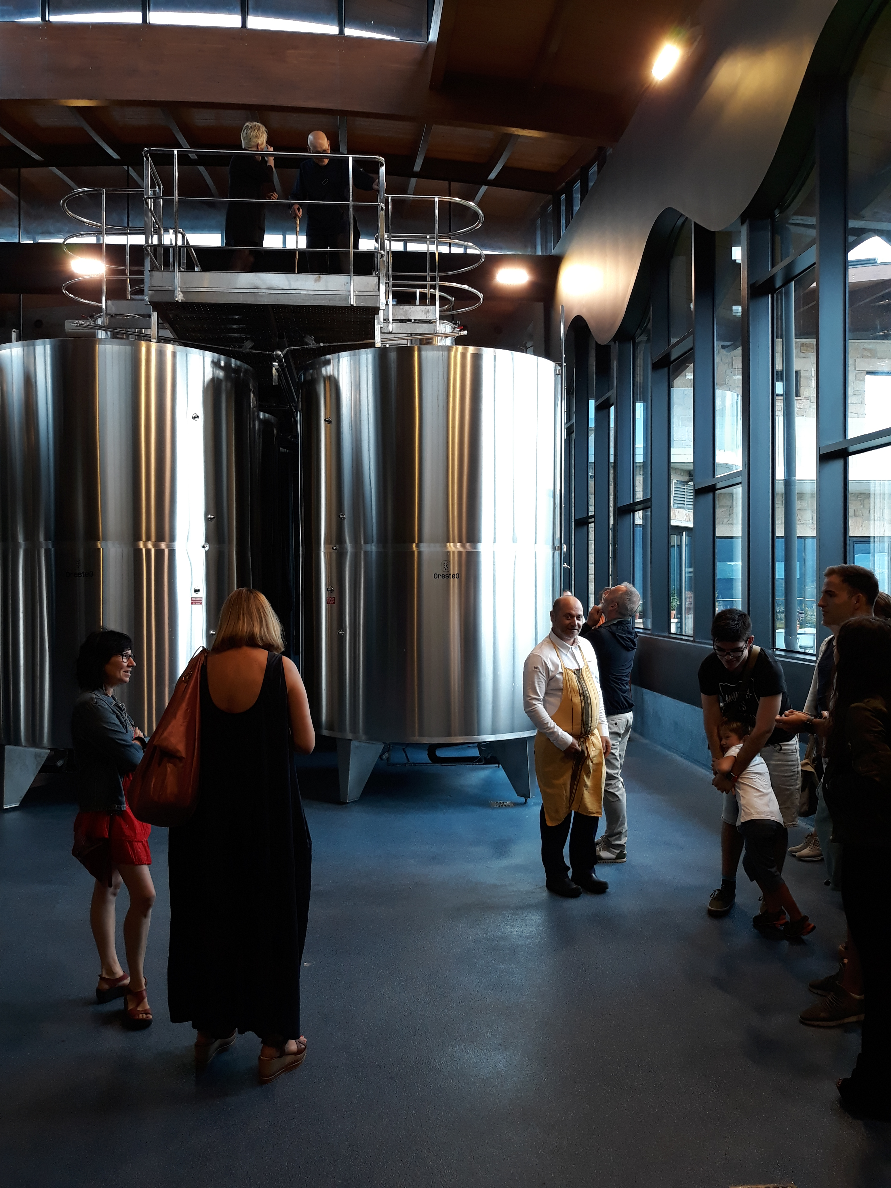 Roberto Ruiz Aginaga sukaldaria, Gipuzkoako Amasa herriko Hika txakolindegian (hango sukaldeko burua baita), 2018ko abuztuaren 13an.